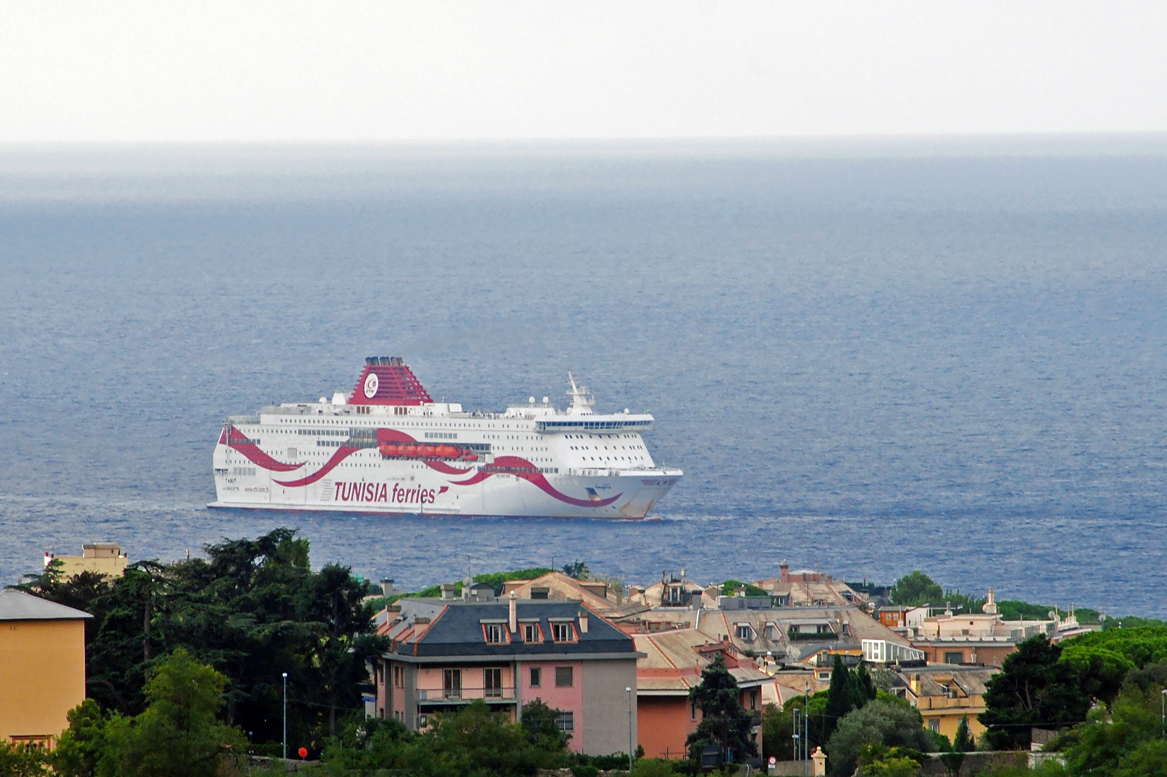 Il traghetto Tanit della Tunisia Ferries in navigazione verso il porto di Genova - settembre 2019.